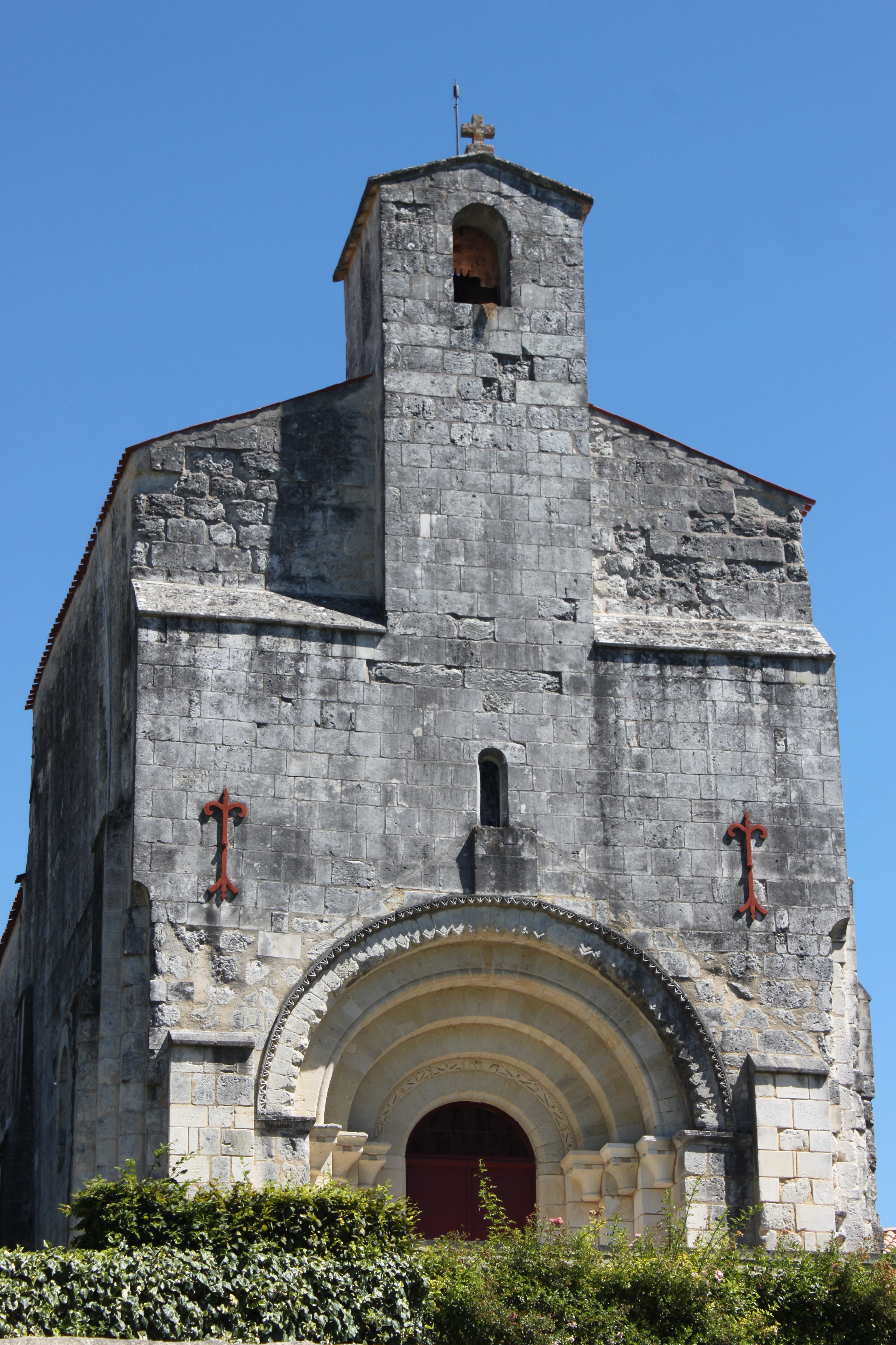 Église Saint-Vivien, Fr-17-Foncouverte.